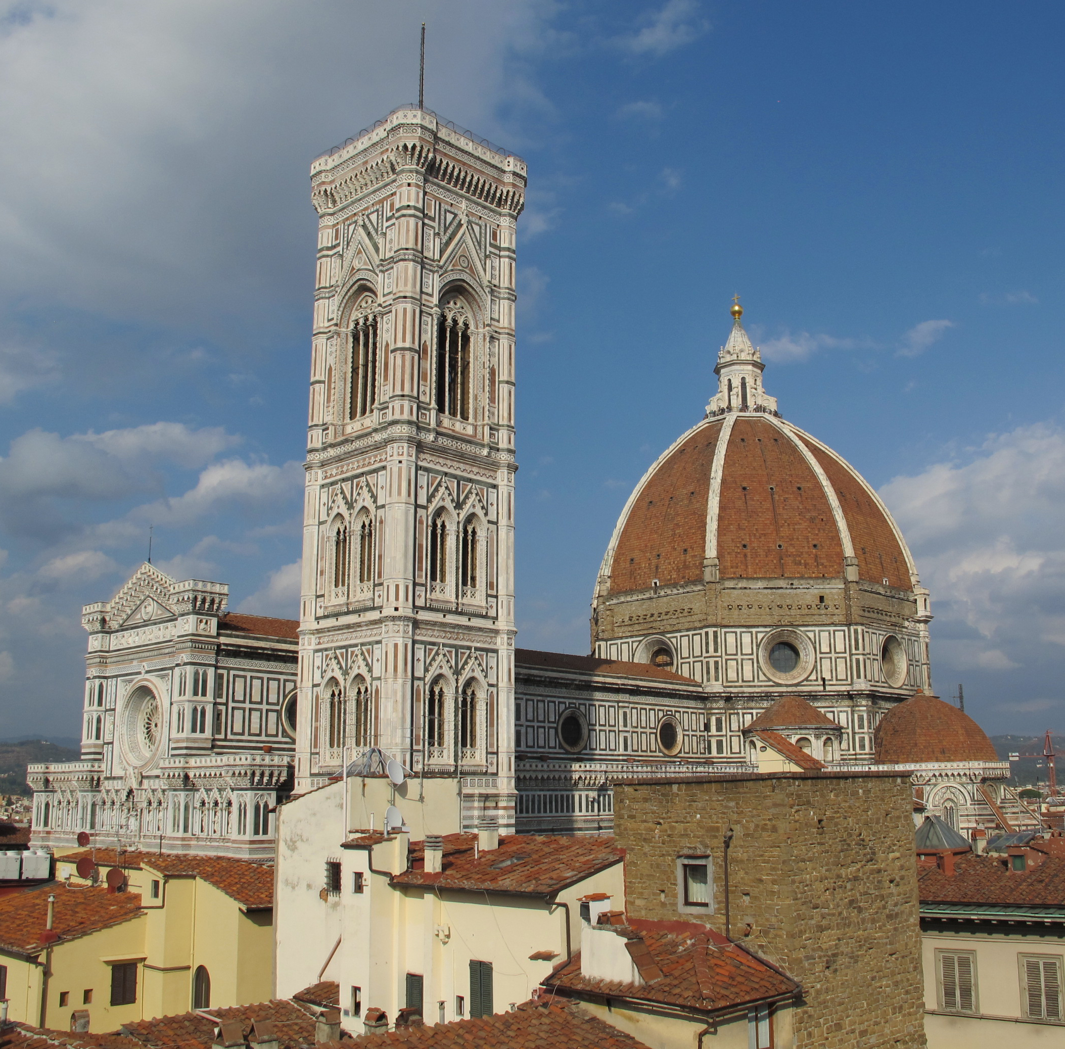 Hotel medici, terrazza, veduta duomo